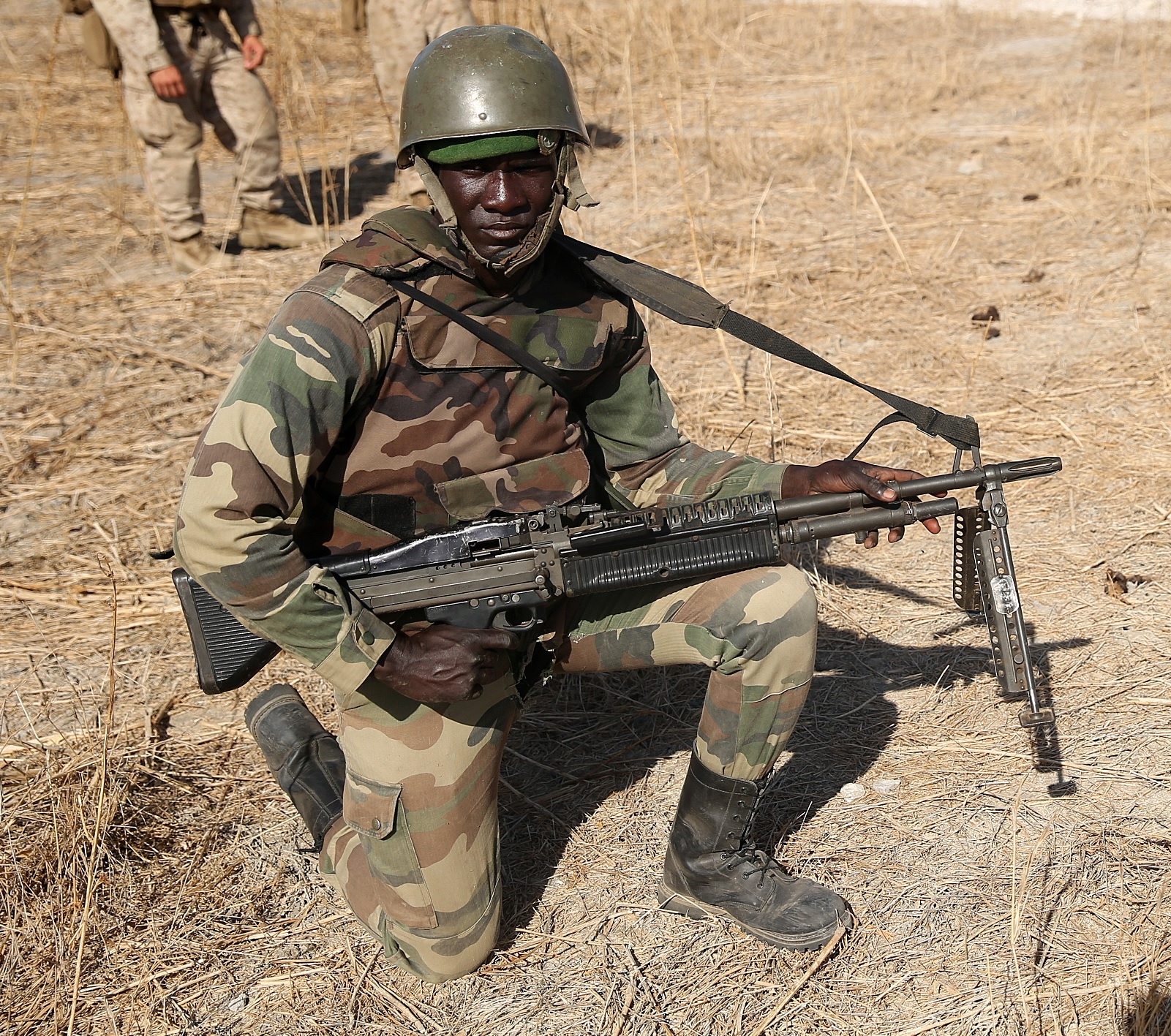 Soldat sénégalais muni d'une mitrailleuse M60.